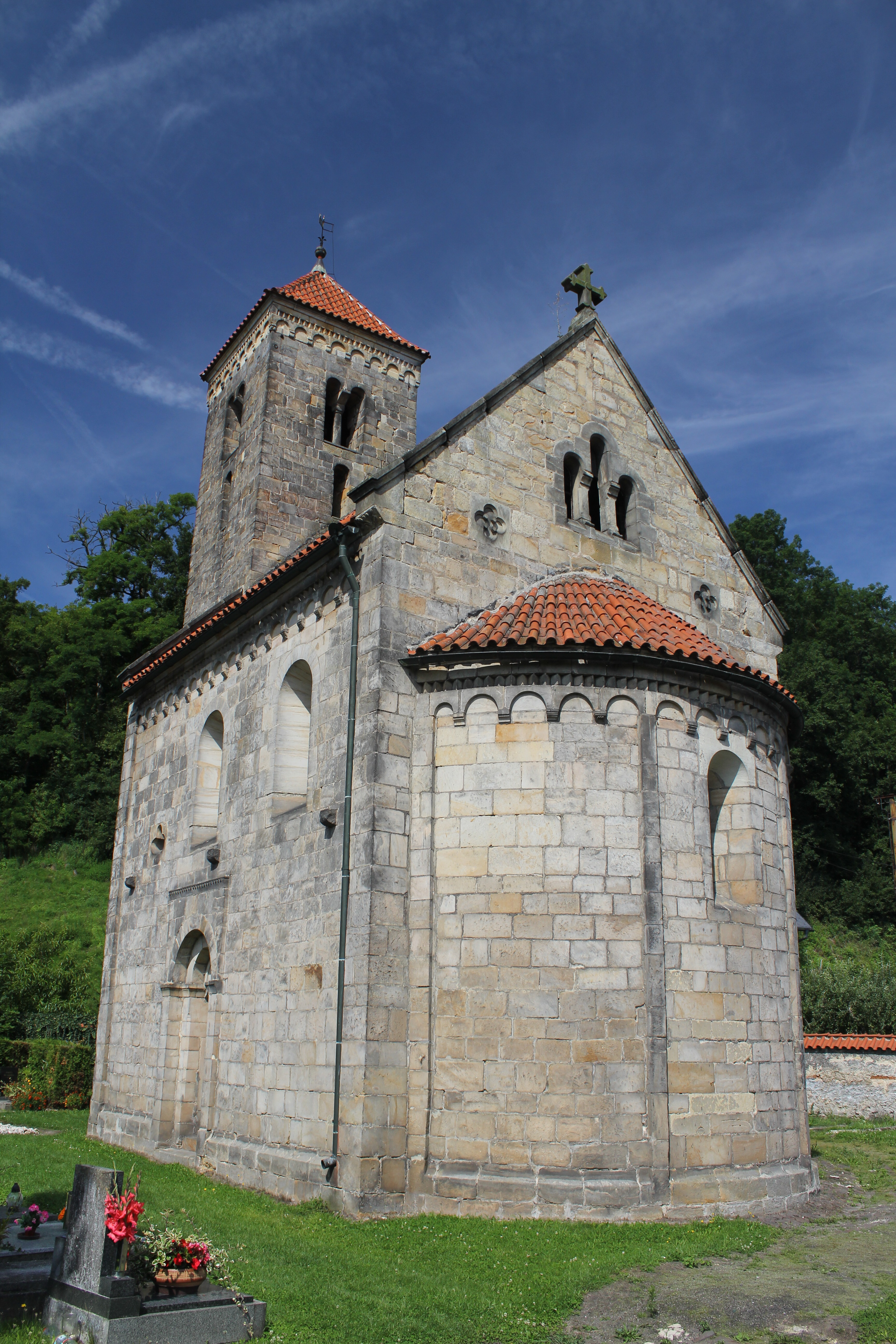 Kostel Nanebevzetí Panny Marie, Mohelnice nad Jizerou